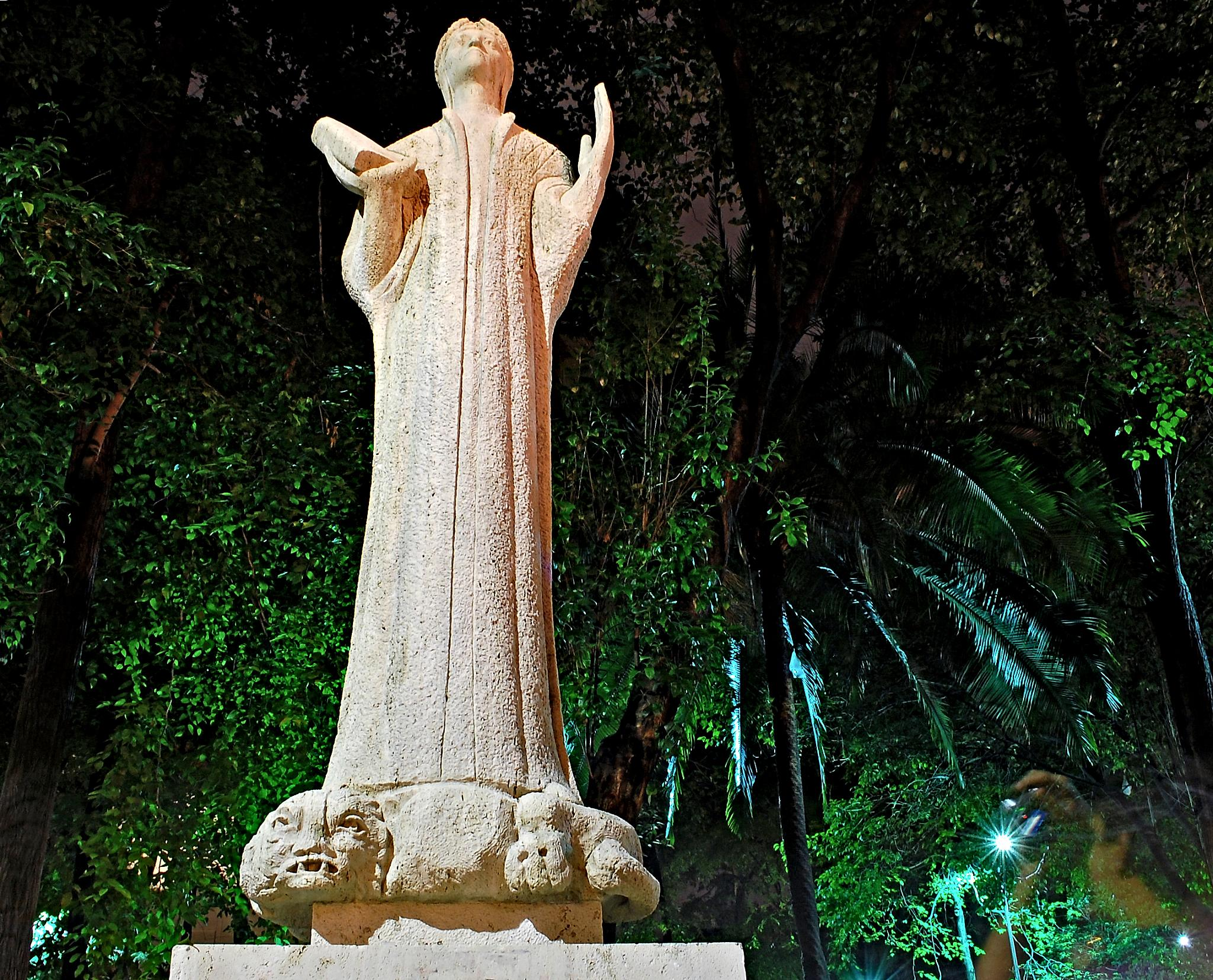 Dante Aleghieri